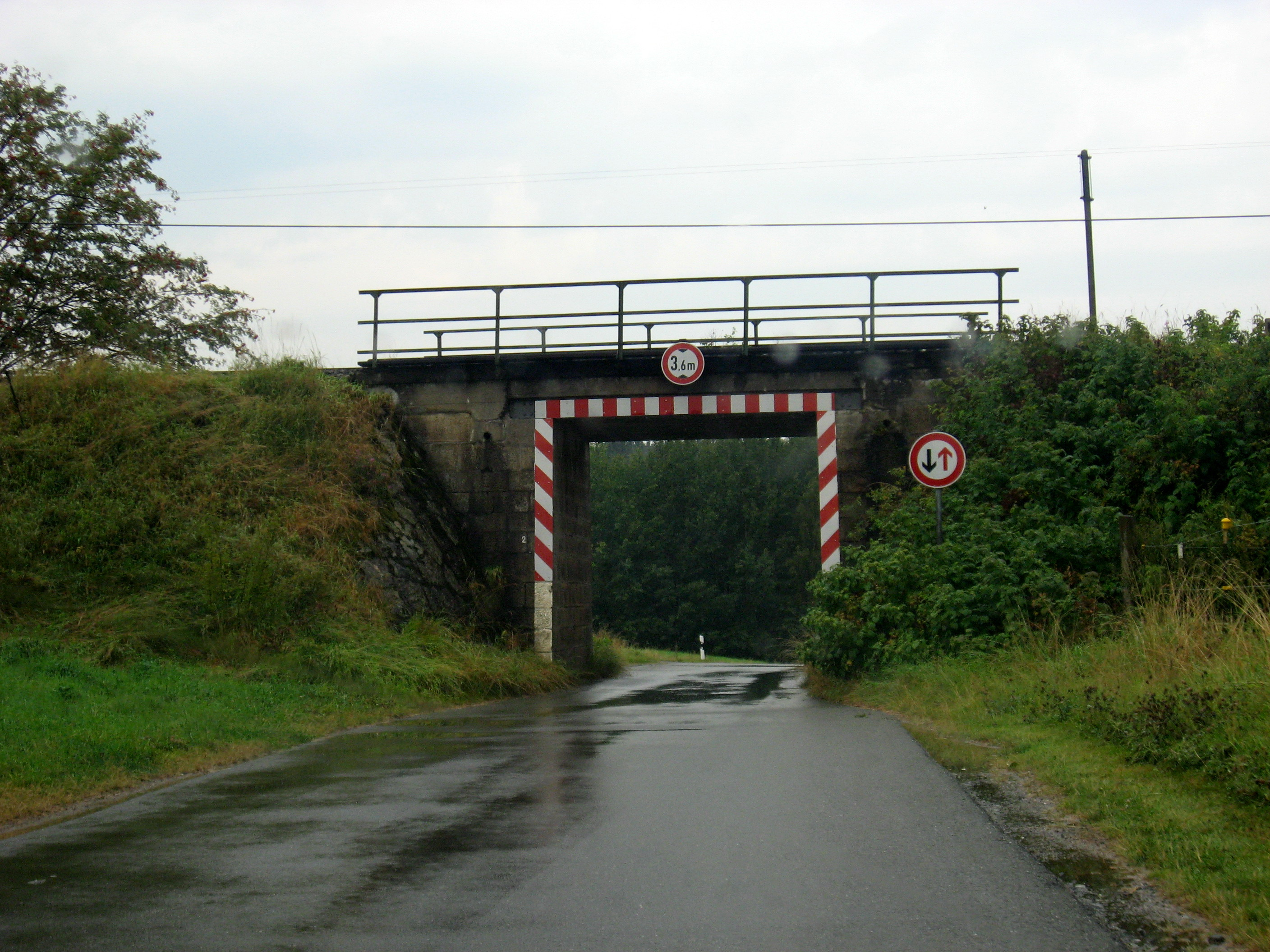 Železniční most u Fohrenreuthu